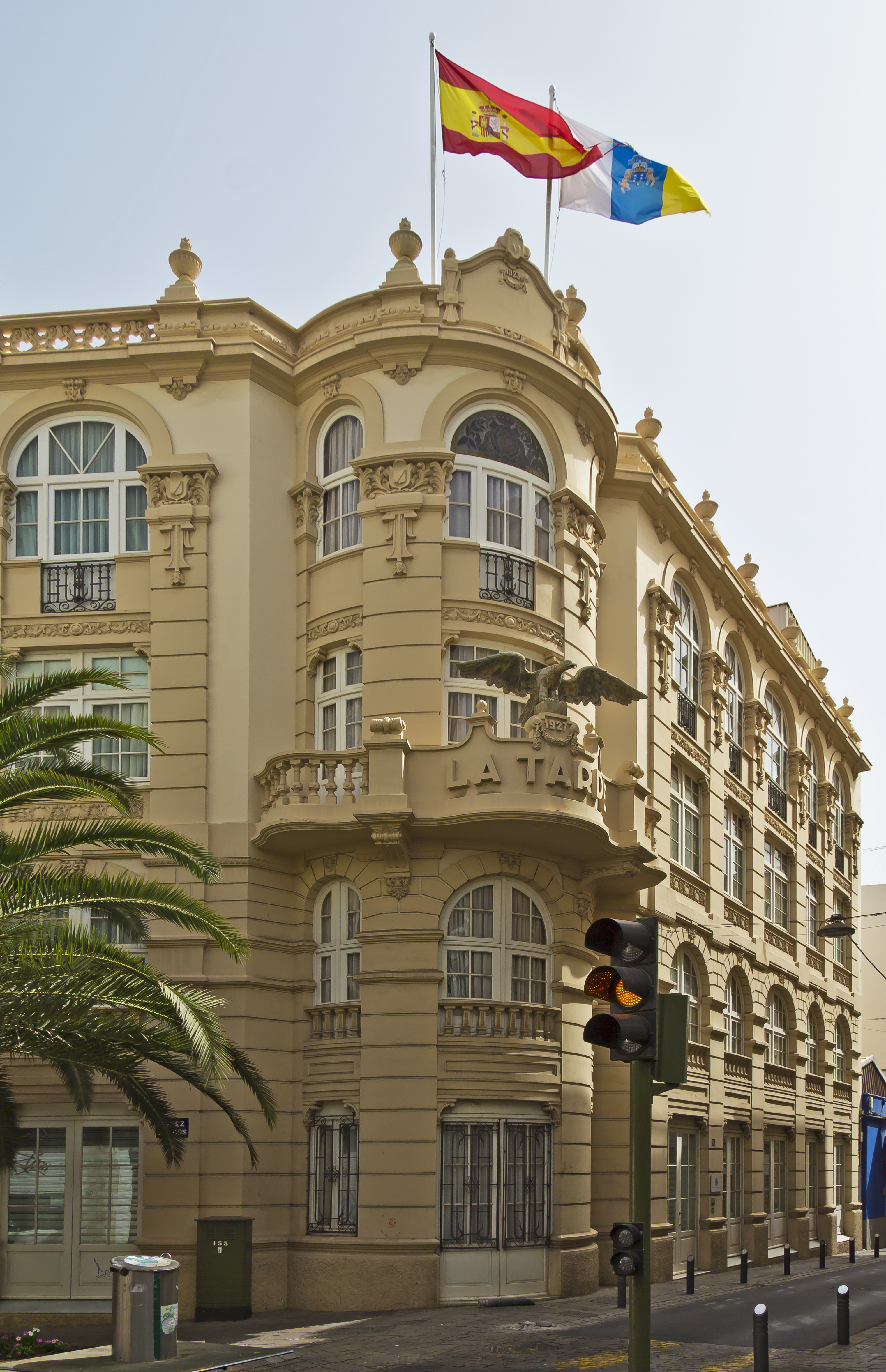 Das Gebäude der Audiencia de Cuentas (Rechnungshof) diente früher als Tabakfabrik. Später war es Sitz der Zeitung La Tarde.